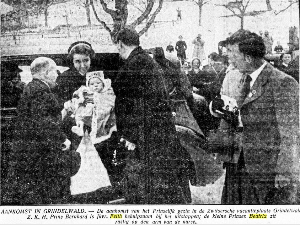 AANKOMST IN GRINDELWALD. — De aankomst van het Prinselijk gezin in de Zwitsersche vacantieplaats Grindelwald: Z. K. H. Prins Bernhard is Jkvr. Feith behulpzaam bij het uitstappen; de kleine Prinses Beatrix zit rustig op den arm van de nurse.